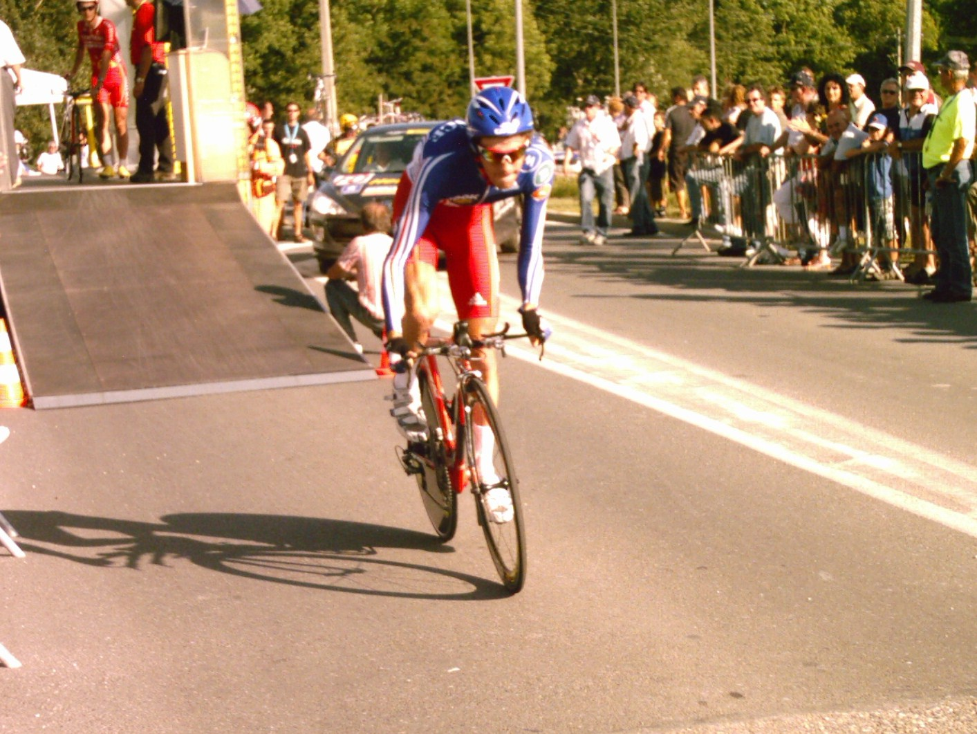 Romain Hardy lors du contre la montre de l'étape 3b du Tour de l'Ain 2009